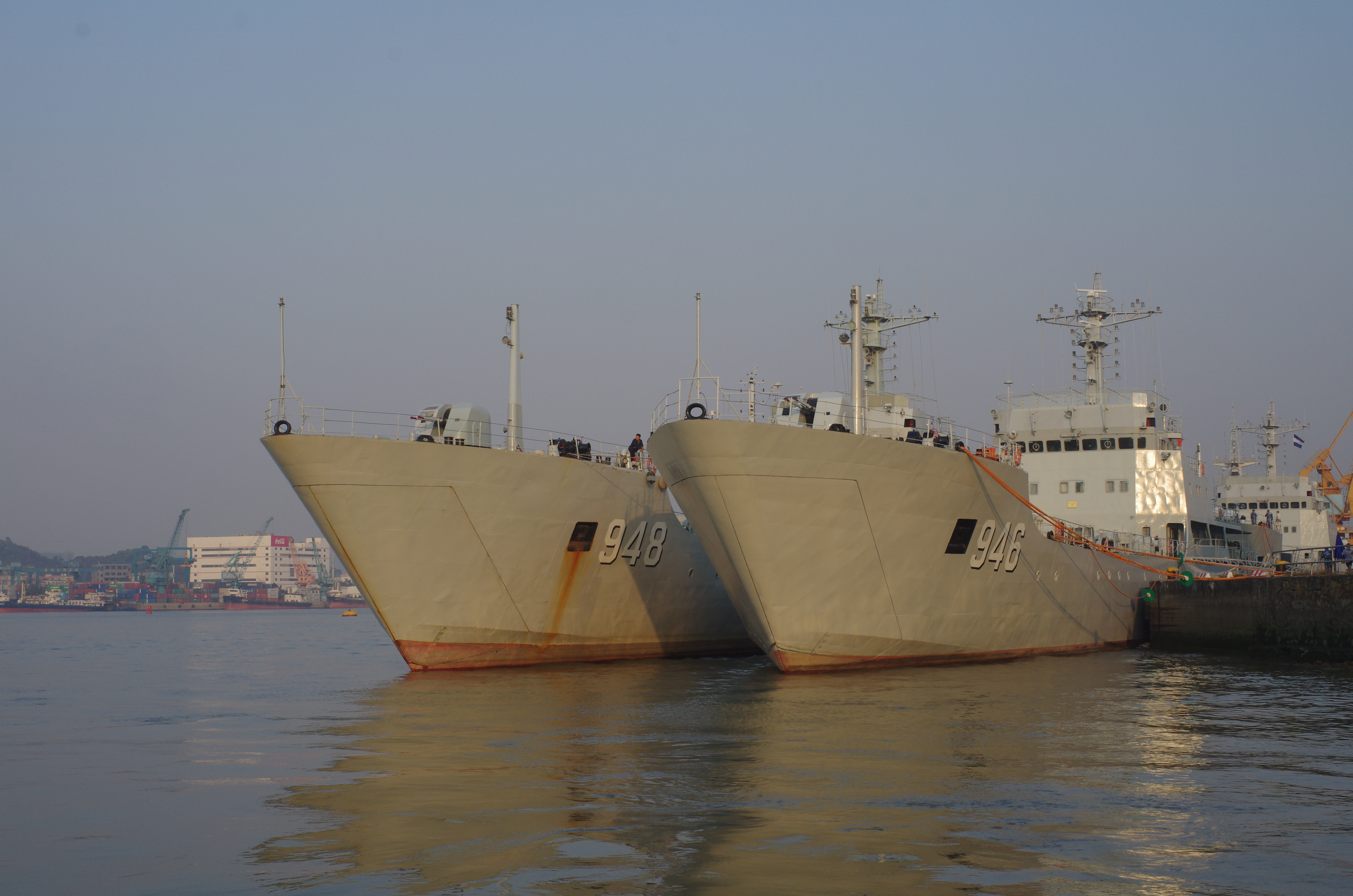 两艘中国人民解放军海军073A型登陆舰（舷号：946、948）停泊在长洲岛黄埔军校外码头